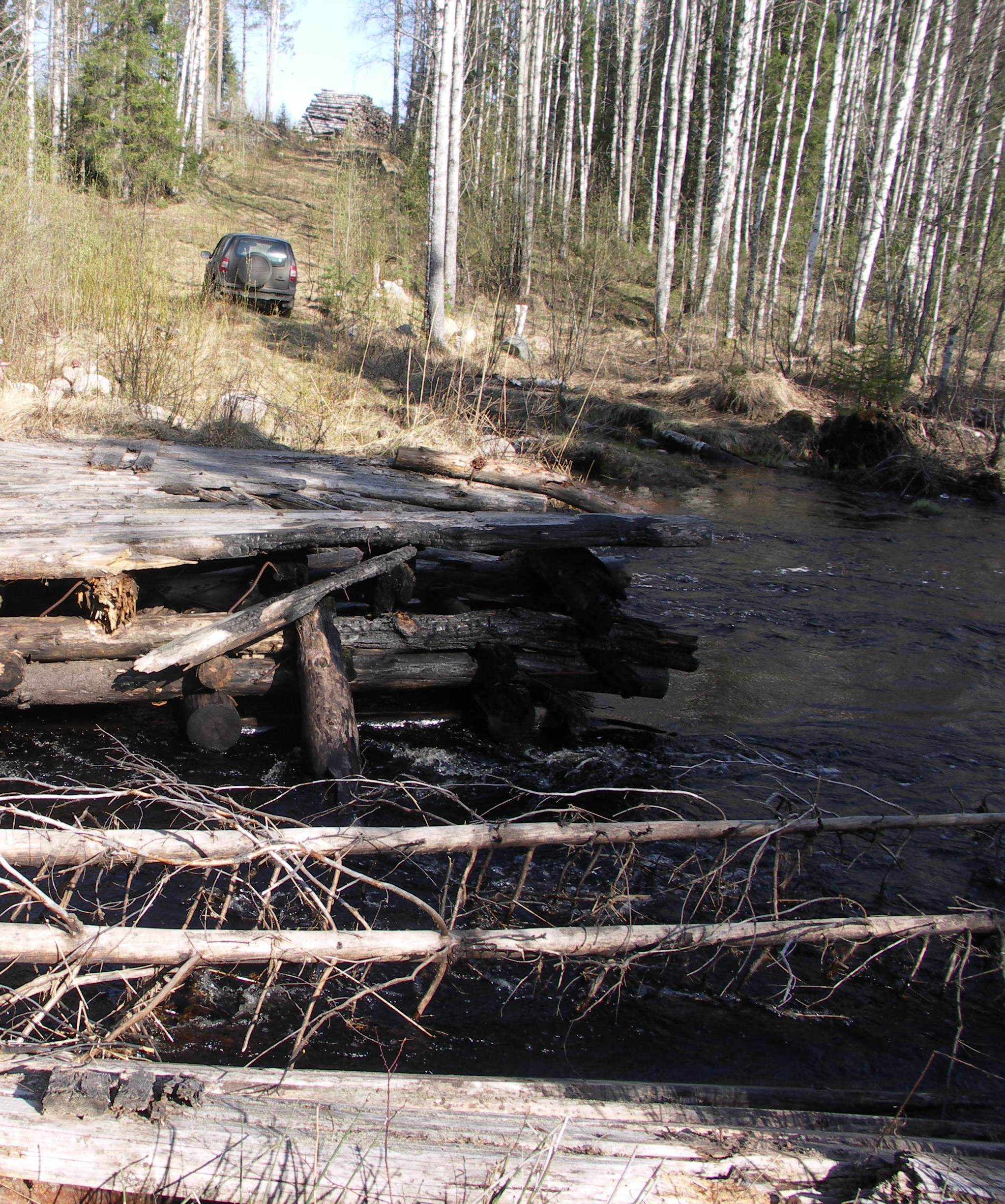 Река Сона в 1,5 км от деревни Сона